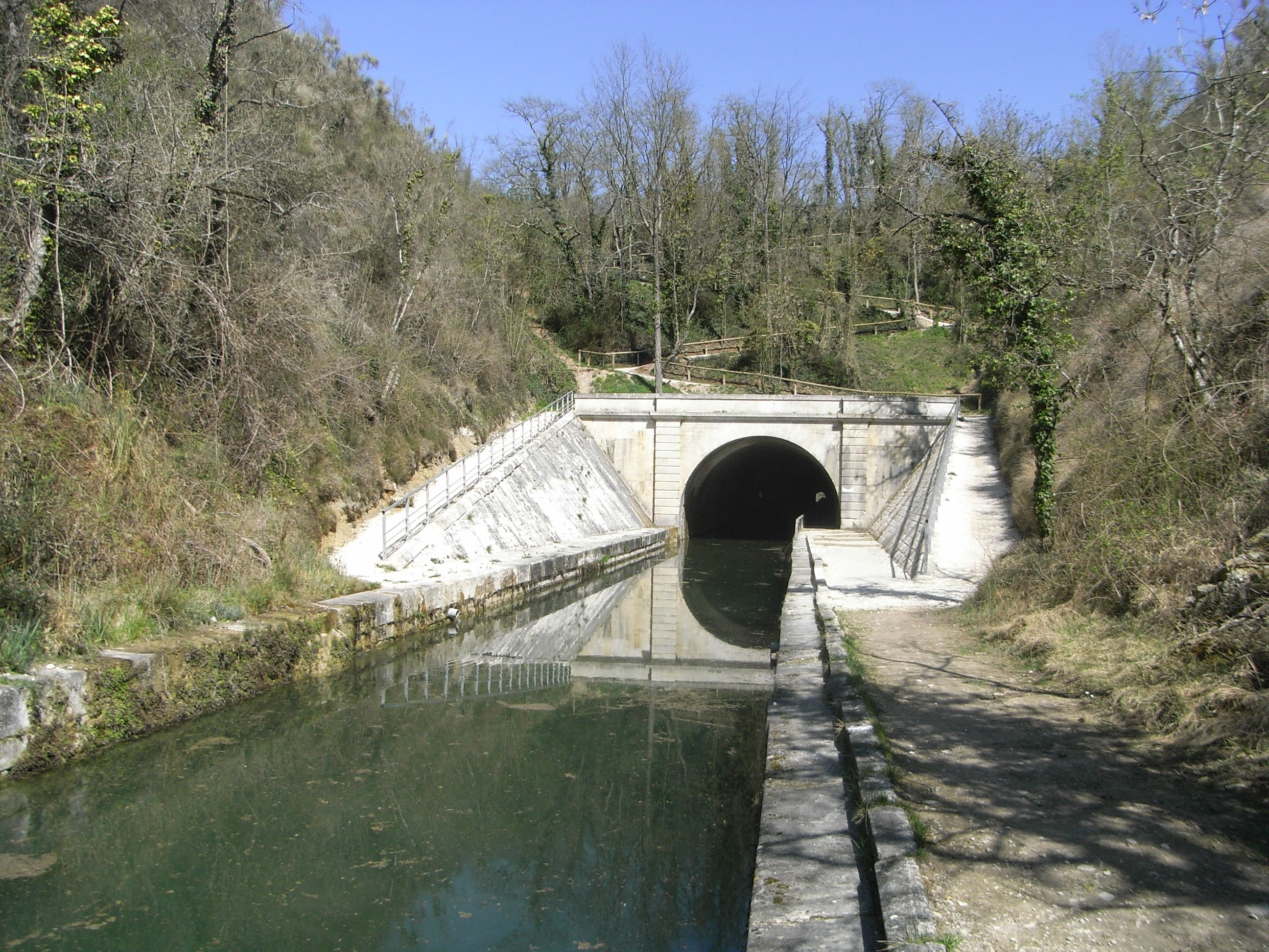 Canal de Marans à La Rochelle (Charente-Maritime - France) - Tunnel Saint-Léonard (1850), sortie sud.